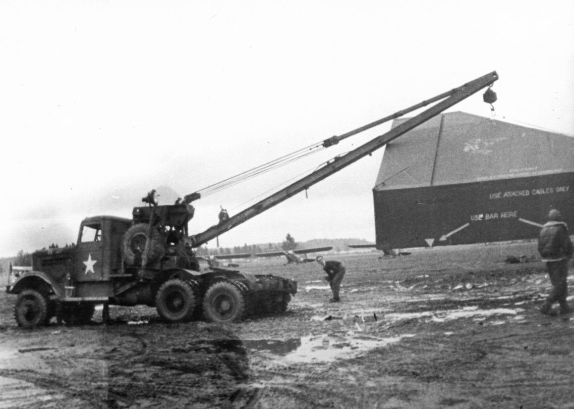 Die Akaflieg Darmstadt München DM 1 am Flughafen Prien am Chiemsee beim Abtransport durch amerikanische Truppen